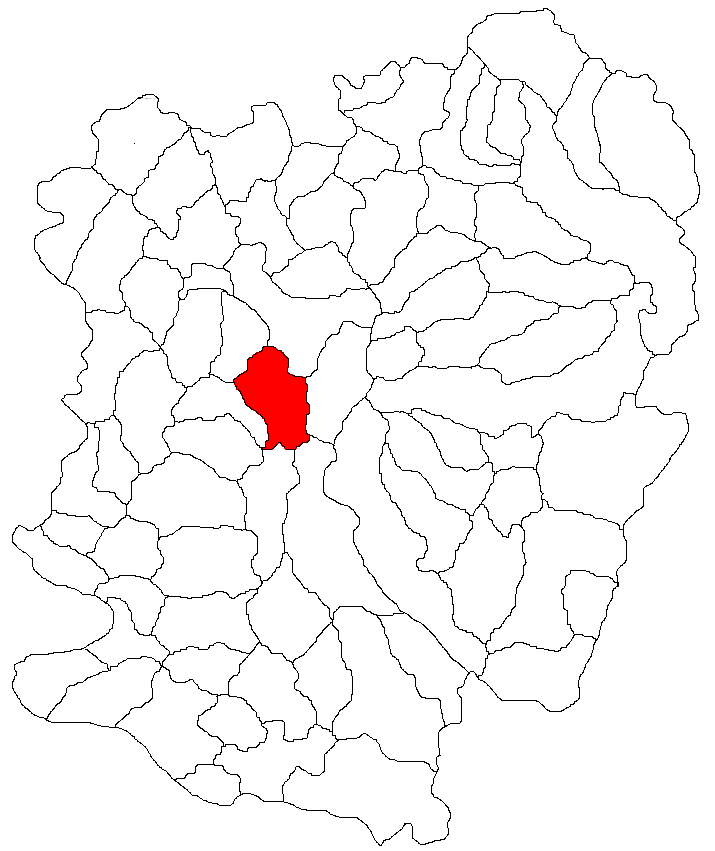 Categorie:Hărţi ale judeţului Caraş-Severin